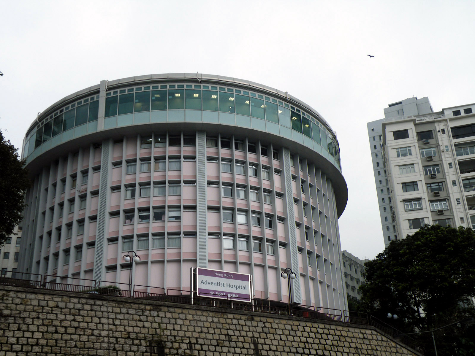 Hong Kong Adventist Hospital